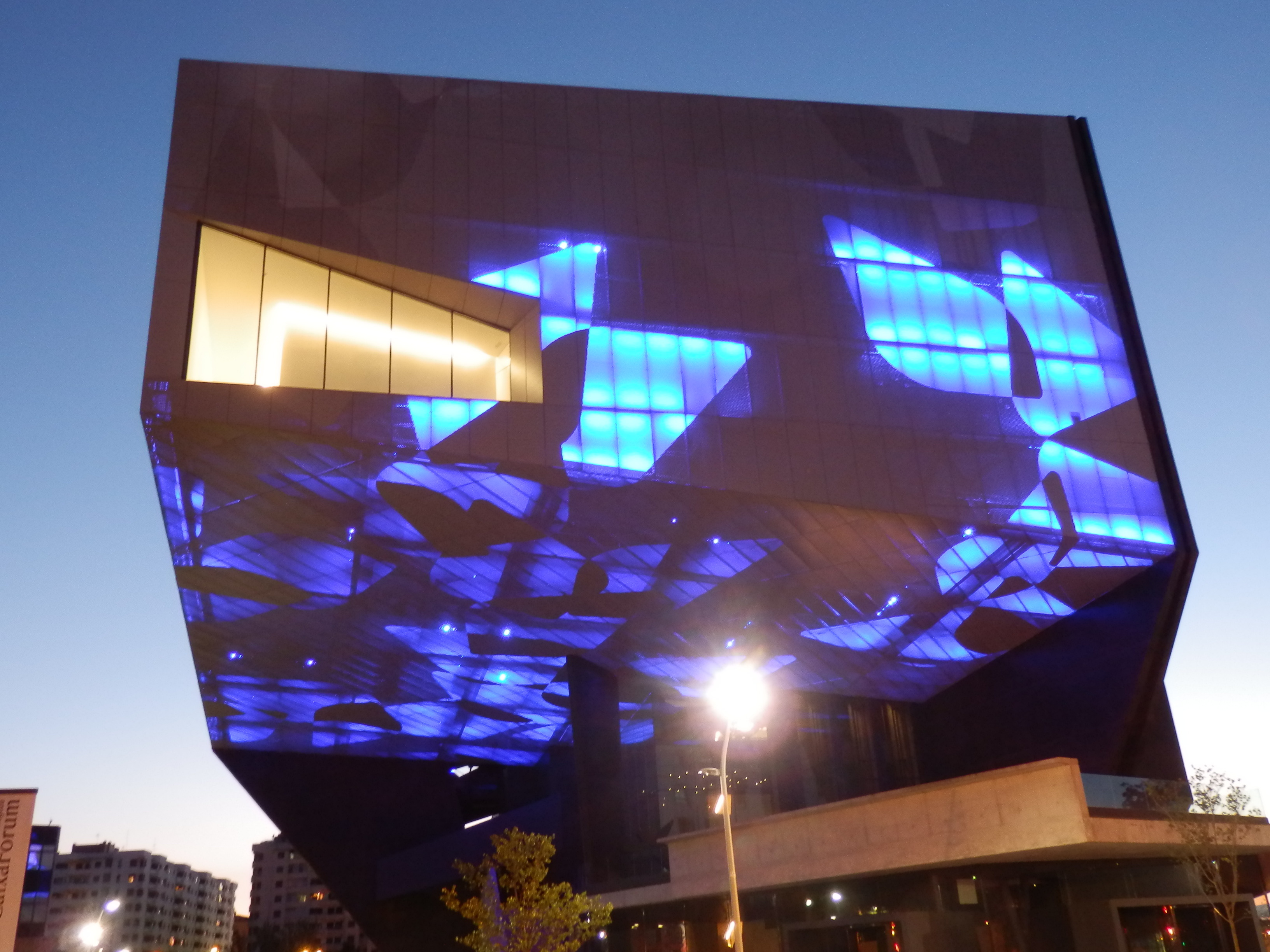 Edificio CaixaForum en la avenida José Anselmo Clavé de Zaragoza.